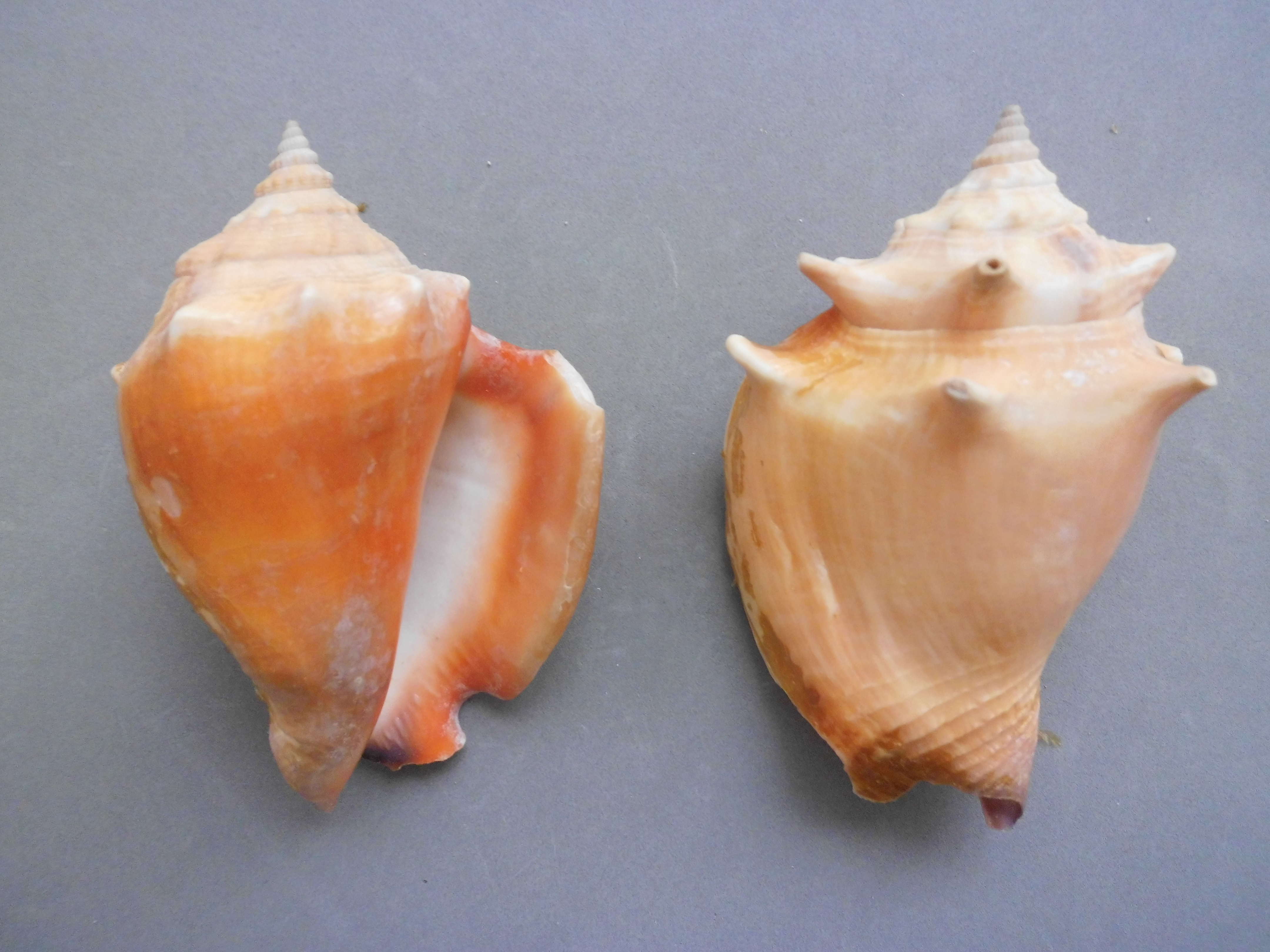 Strombus pugilis Linnaeus, 1758 Isla La Orchila, Dependencias Federales - Venezuela